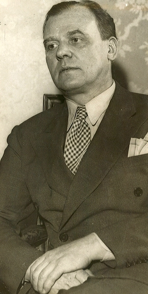 portrett, mann, operasanger, sittende halvfigur.